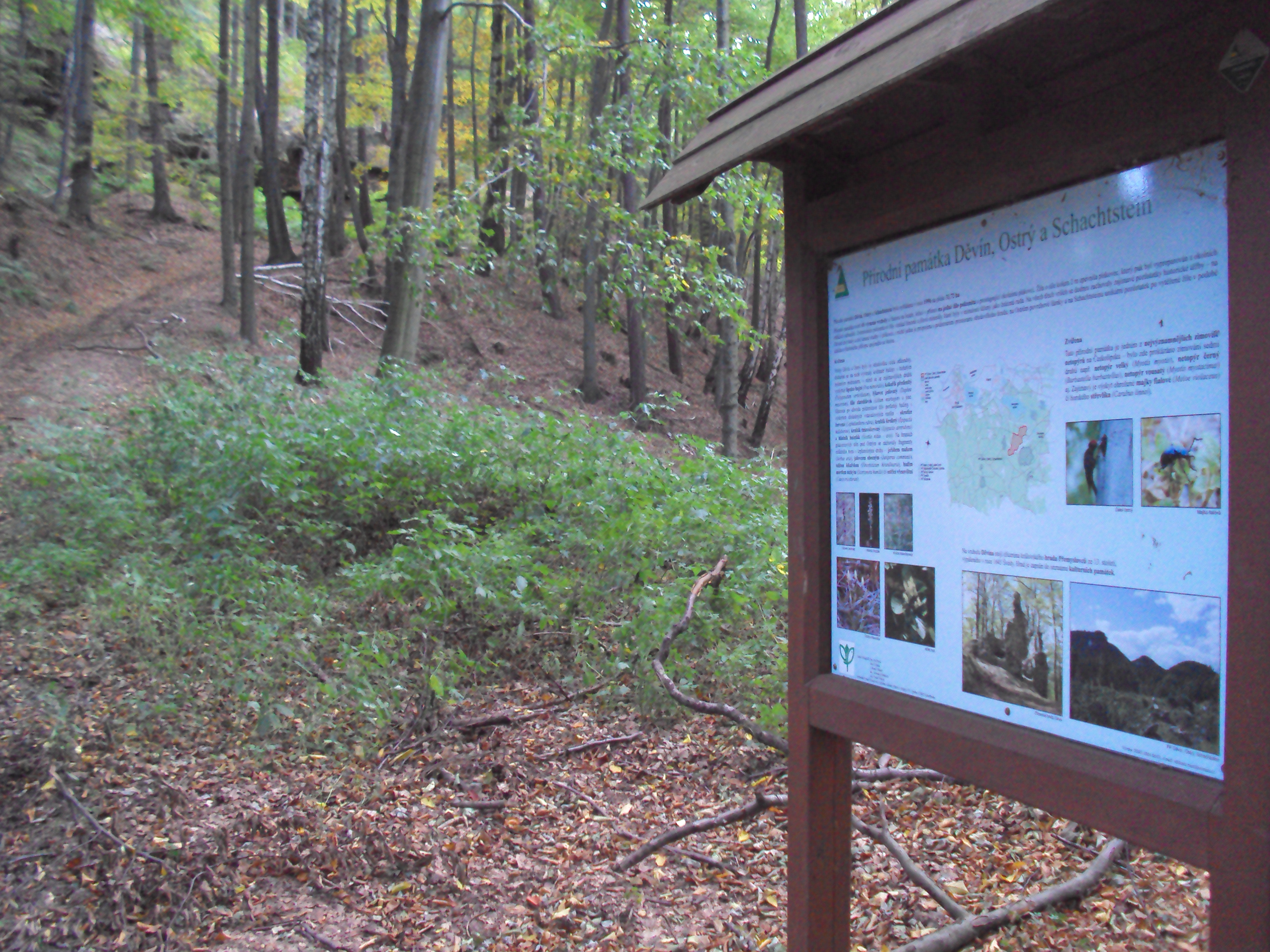 Přírodní památka Děvín,Ostrý,Schachstein 2 km JV od Hamr na Jezeře